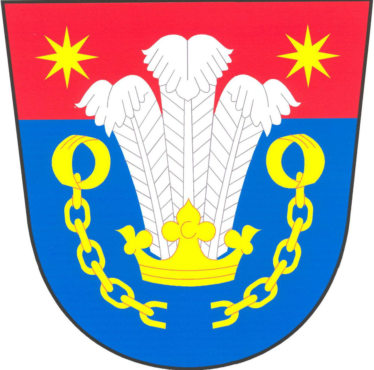 Znak obce Tuřany (okres Kladno)